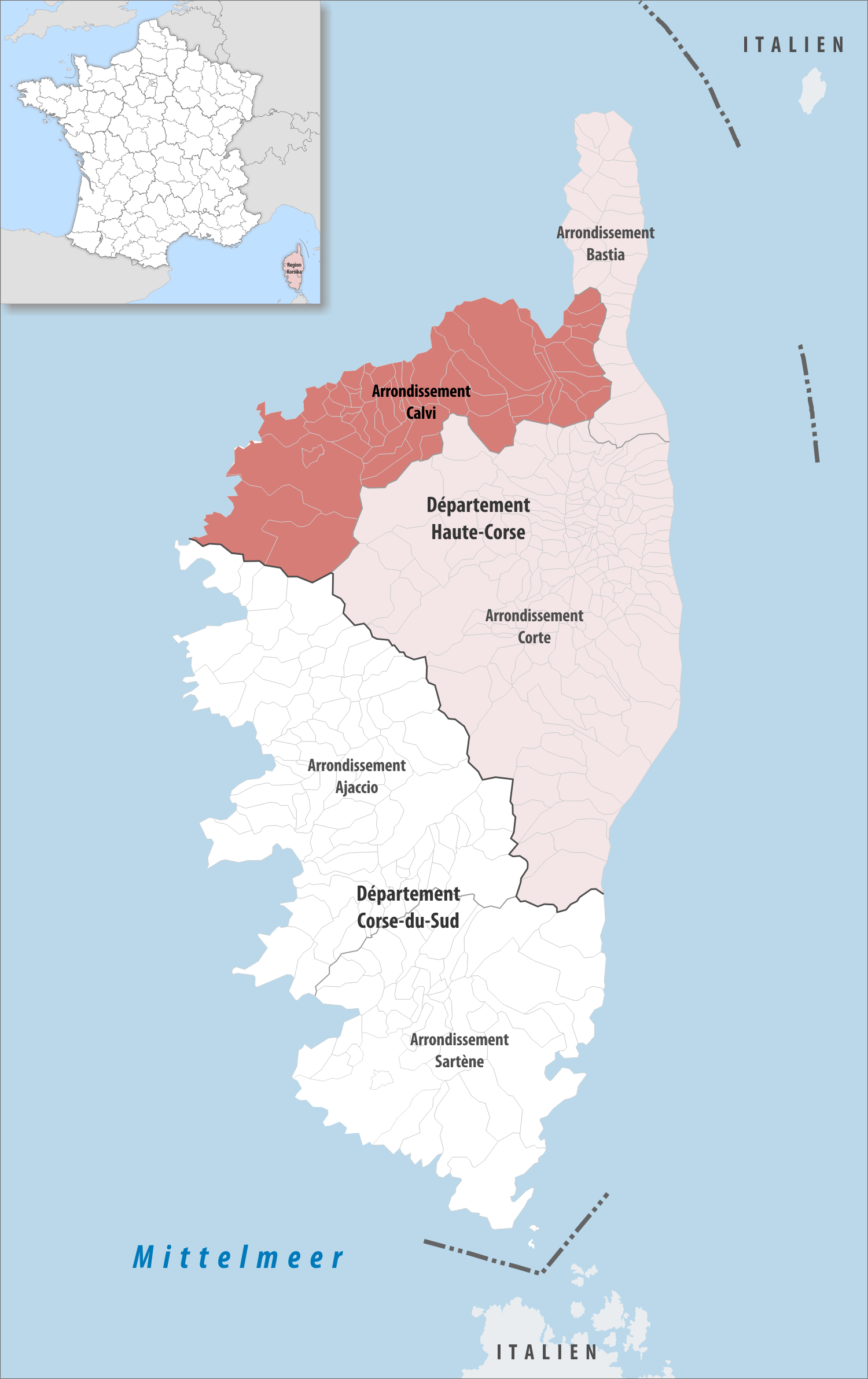 Lage des Arrondissements Calvi